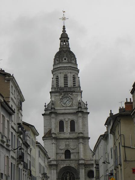 Tour-clocher de la co-cathédrale N.D. de Bourg en Bresse (01)